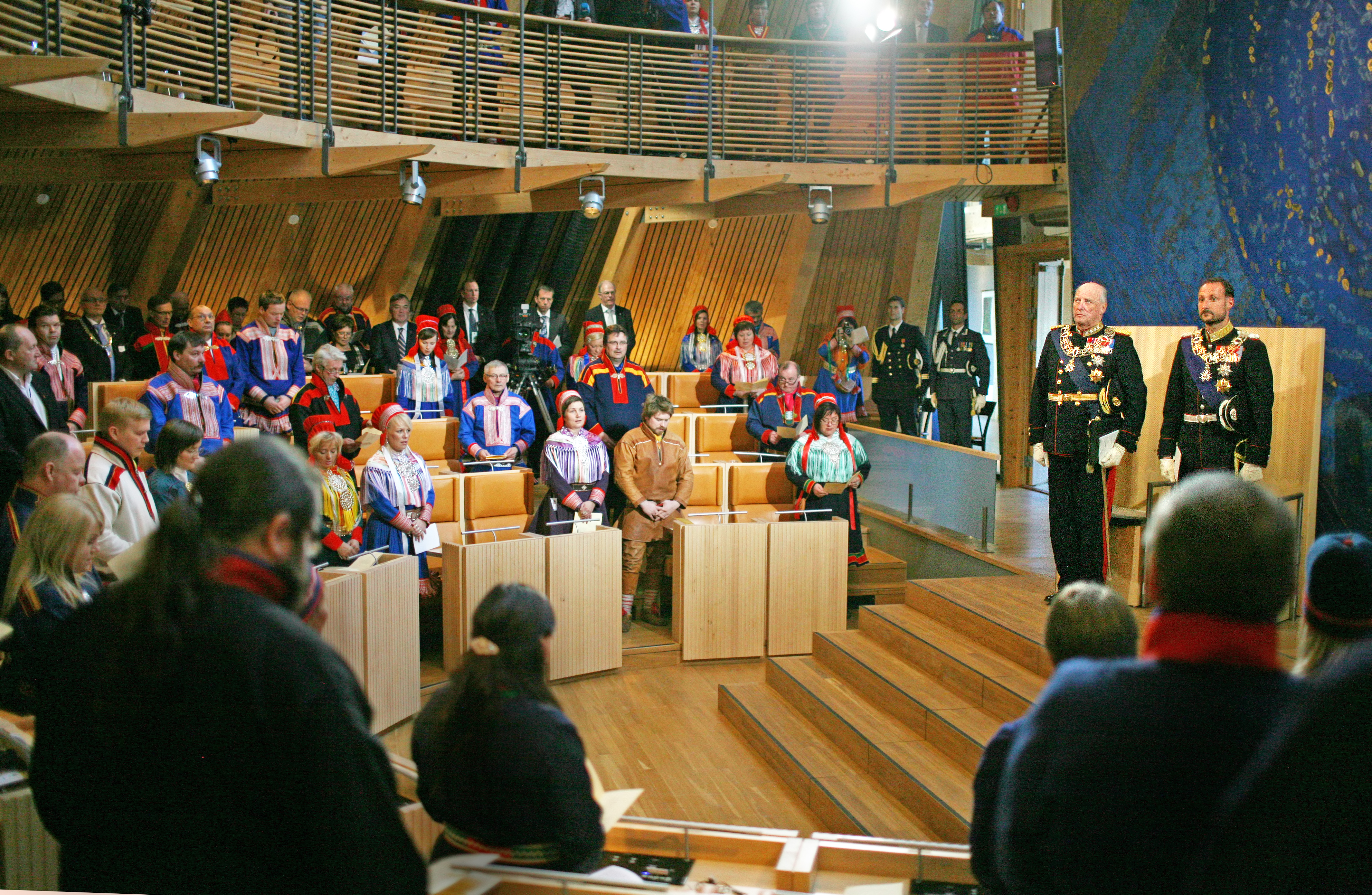 Foto: Kenneth Hætta